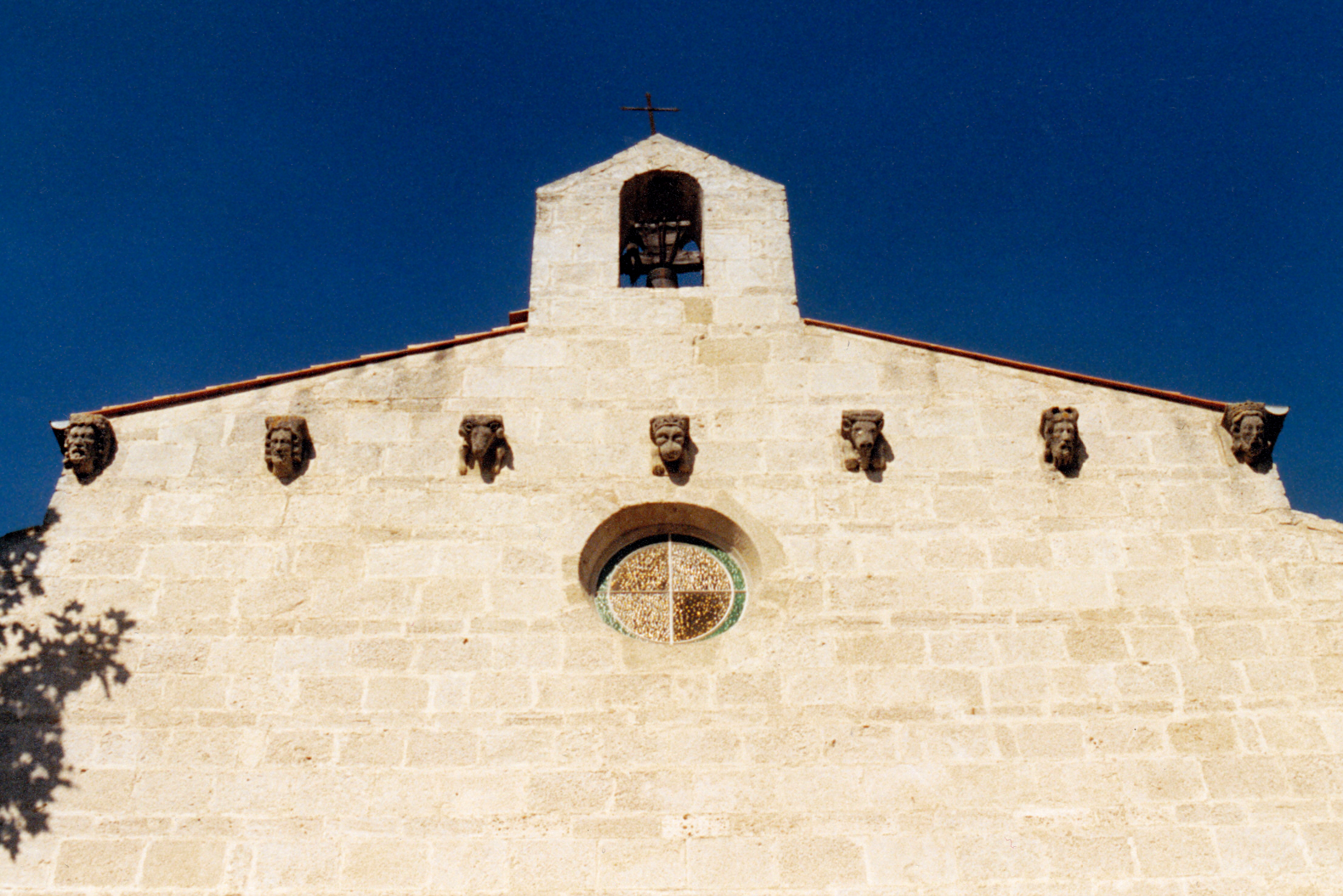 France - Languedoc - Hérault - Église Saint-Laurent de Lattes